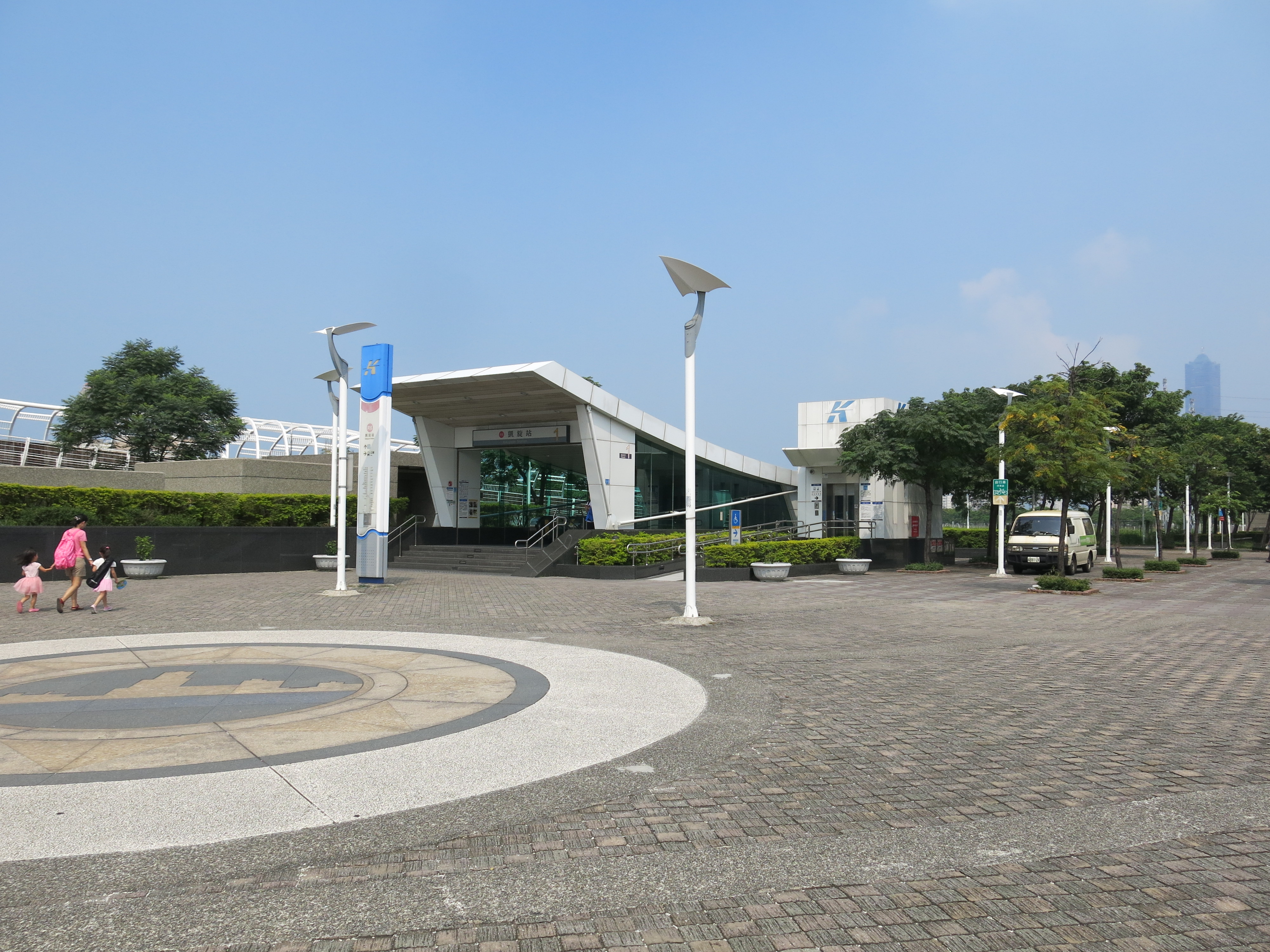 中文（台灣）: 高雄捷運紅線凱旋站1號出口